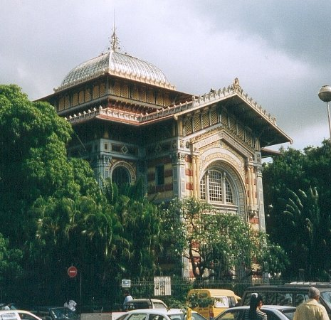 FC Georgio 1997 Photo libre de reproduction avec mention de son auteur